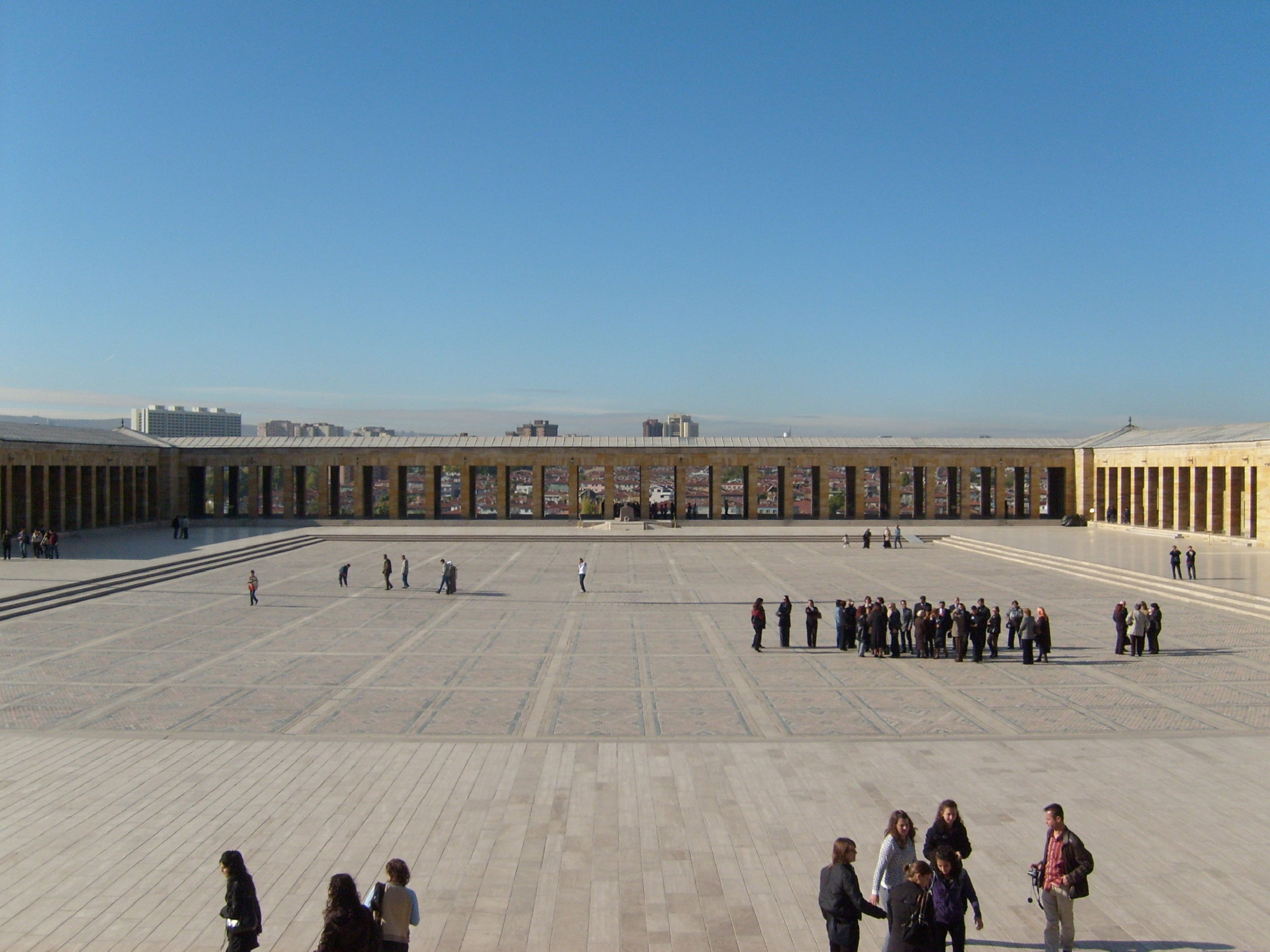 Anıtkabir "Zafer Alanı"